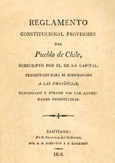 Portada del Reglamento Constitucional de 1812 del pueblo Chileno.